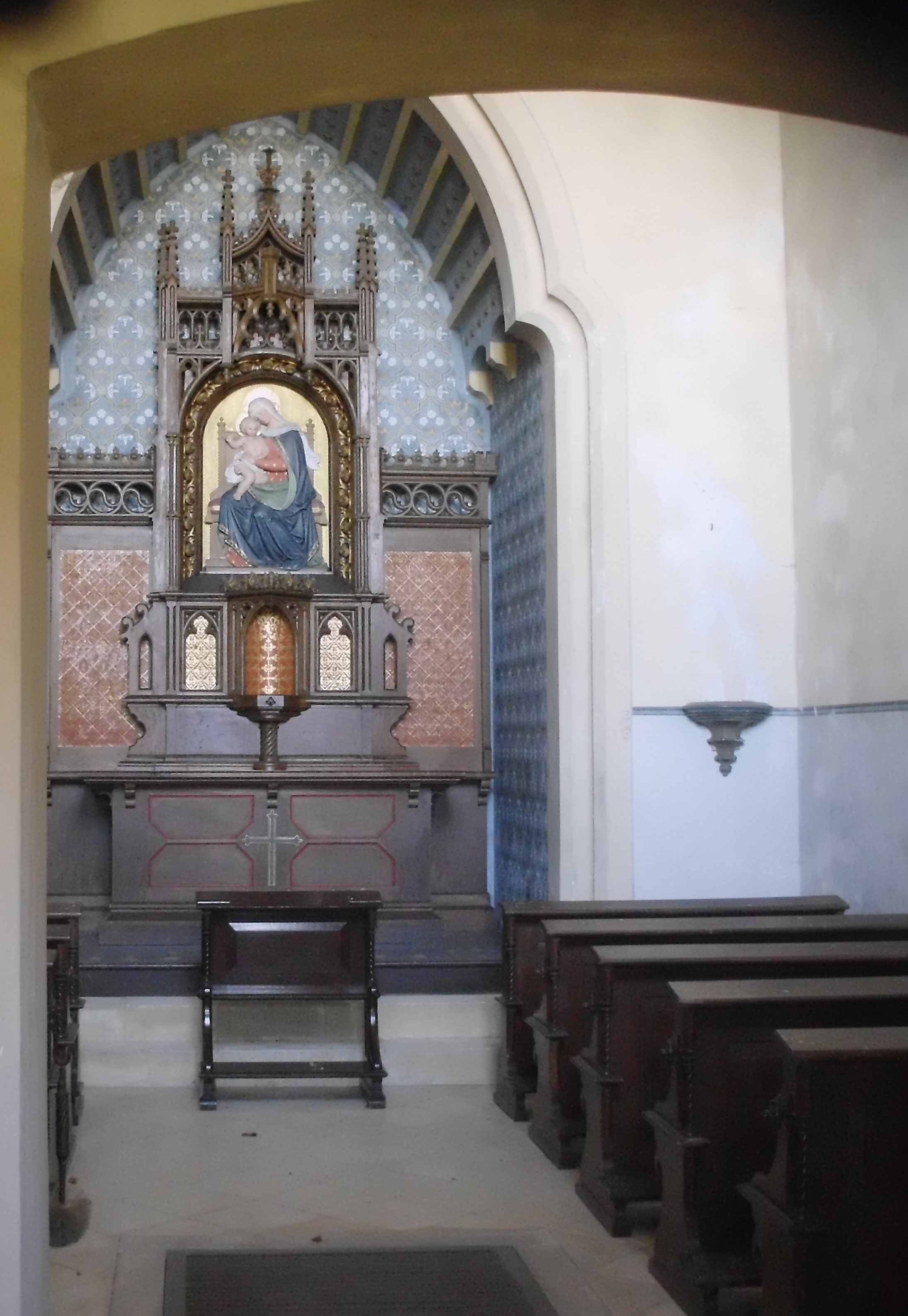 Gruftkapelle auf dem Antoniberg bei Stepperg, Ortsteil von Rennertshofen im Landkreis Neuburg-Schrobenhausen, Blick in das Kapelleninnere